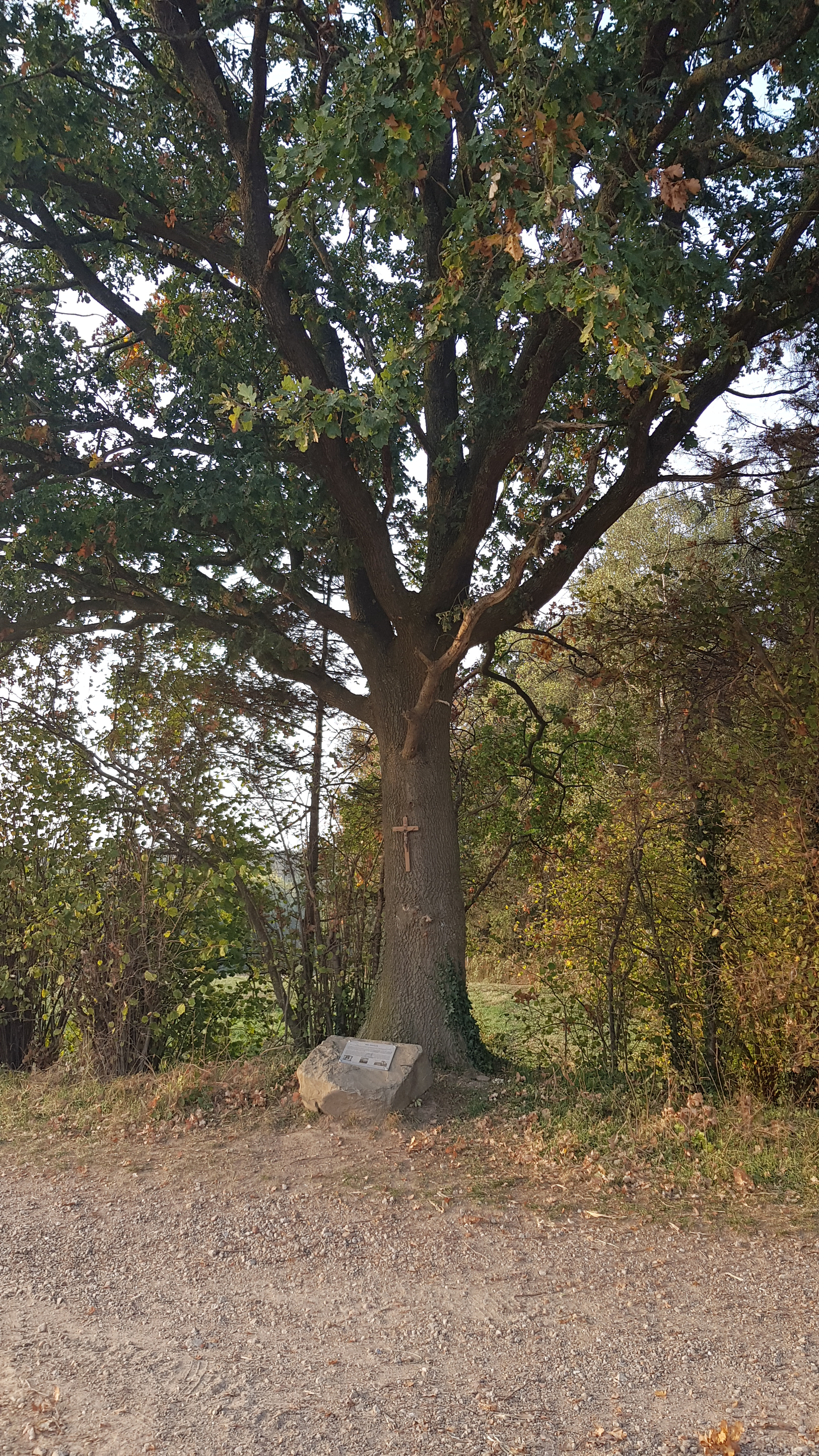 Het Gericht aan de Wijlre Gerichtweg, Beertsenhoven, Wijlre, Gulpen-Wittem, Nederland